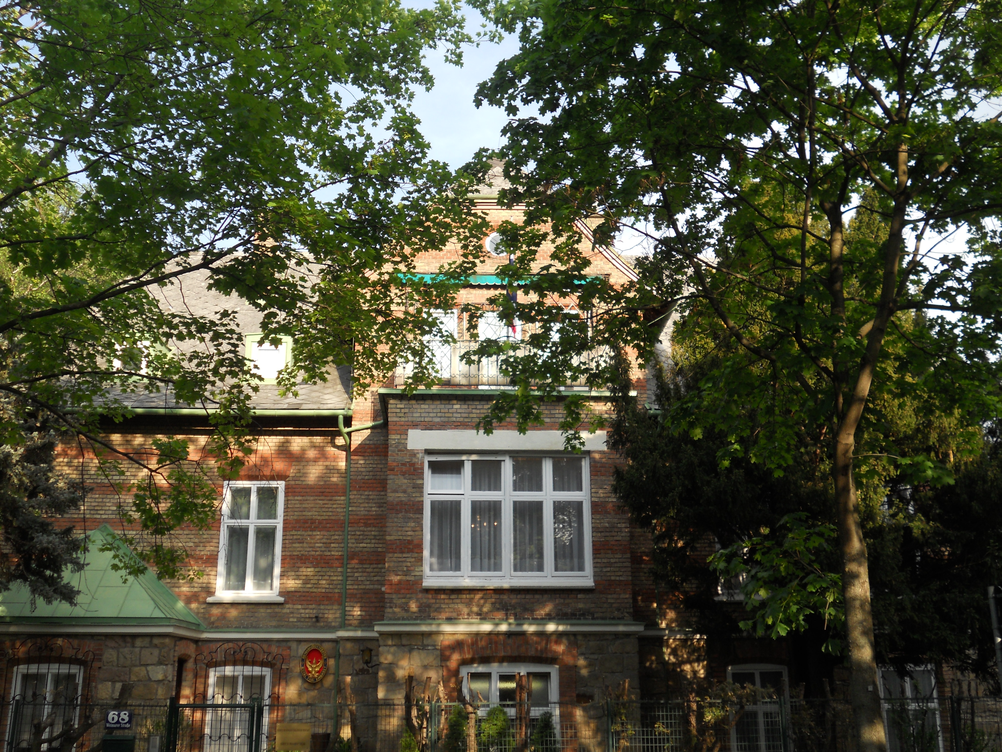 Haus Cottagegasse 68, die ehemalige thailändische Botschaft in Wien